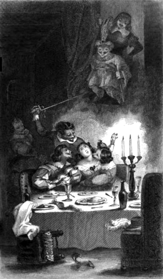 Illustration of El Diablo cojuelo (Le Diable boiteux) (1707) Alain-René Lesage (1668-1747).